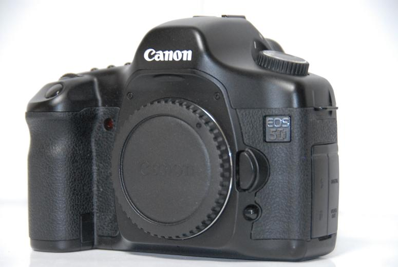 EOS-5D